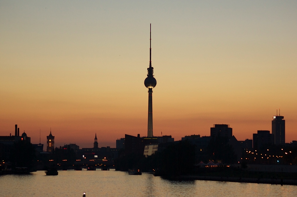 Komunikaziorako dorrea iluntzean.